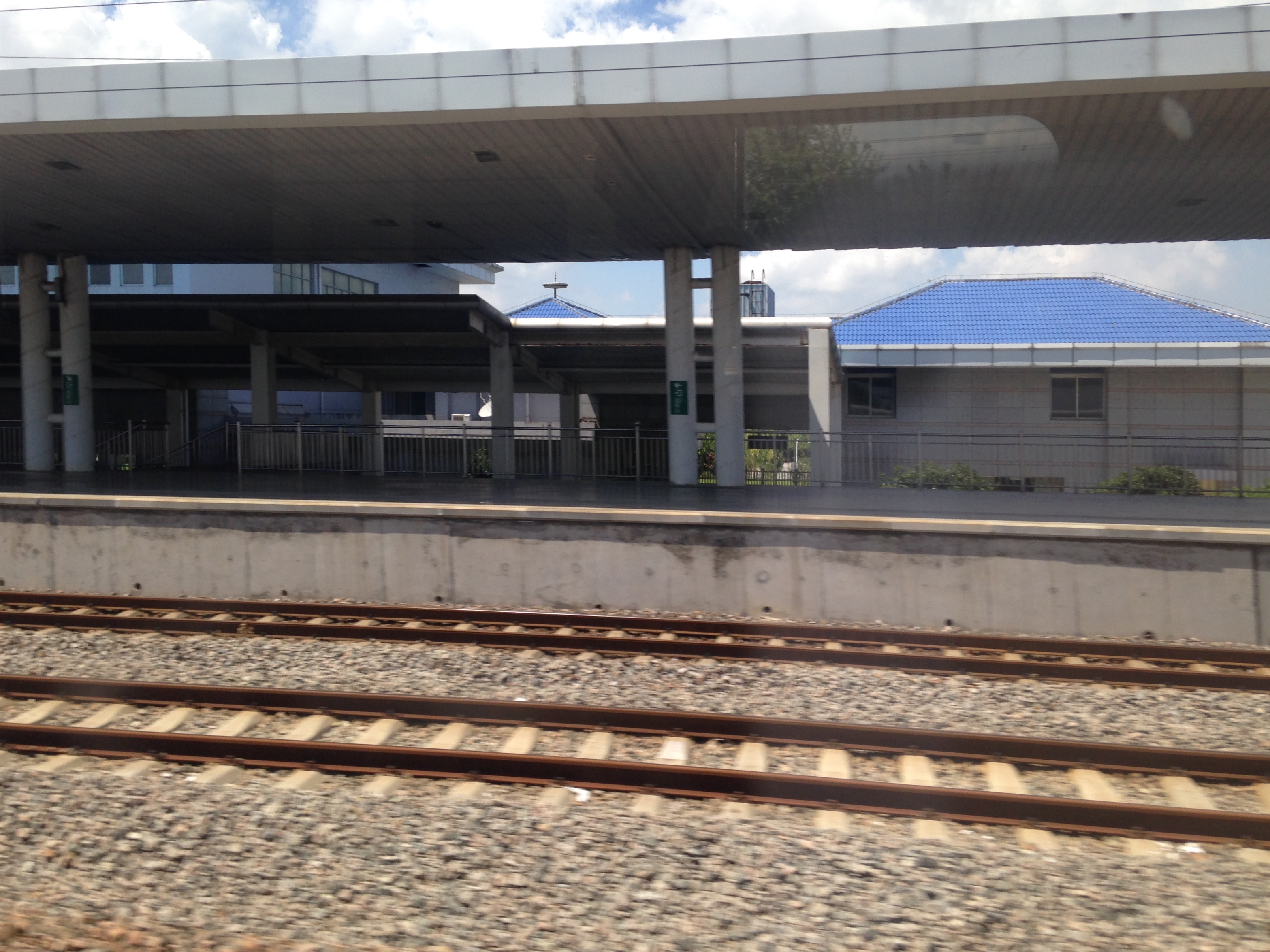 寧合鉄道の列車内より望む肥東駅のホーム